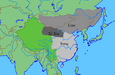 Karte der Liao- und Song-Dynastie